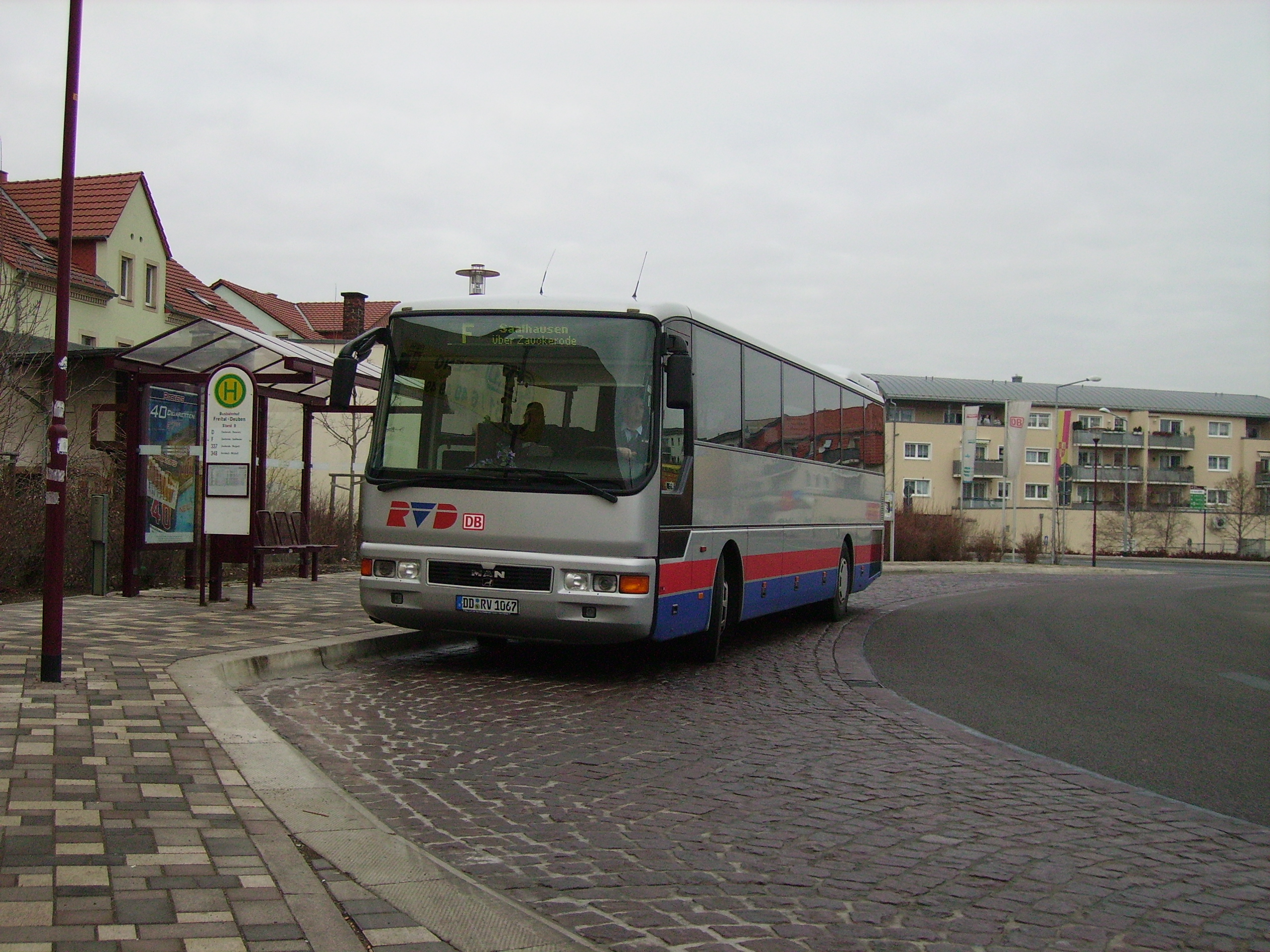 Ein MAN Überlandbus der RVD-Linie F am Busbahnhof Freital-Deuben